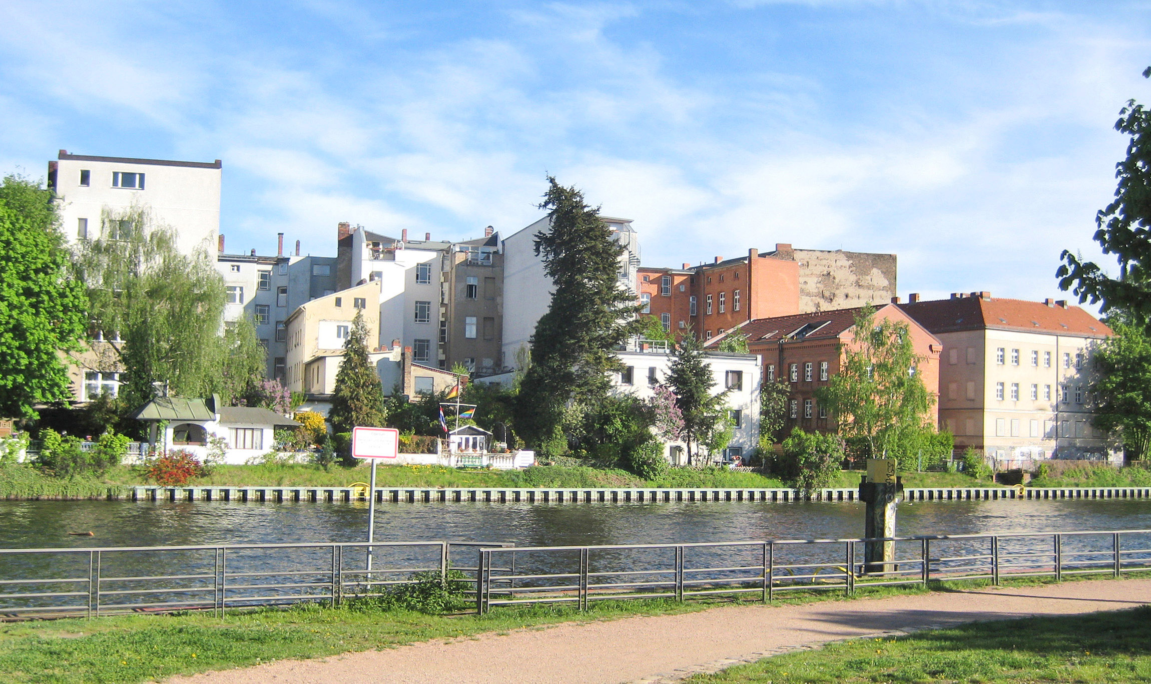 Blick von der Altstadt Spandau zum südlichen Teil des Stresow (zur Plantage)